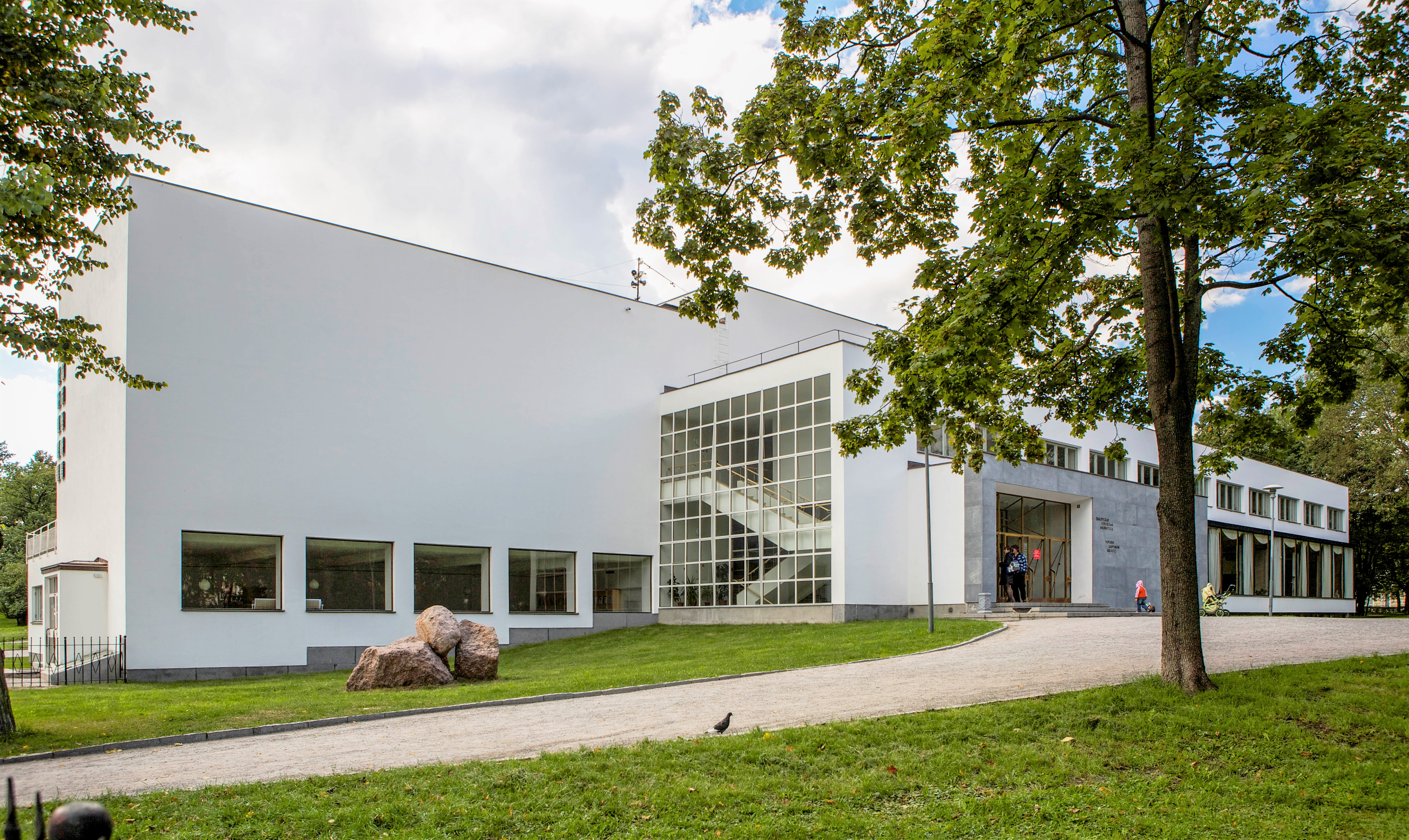 Viipurin kirjasto Alvar Aalto